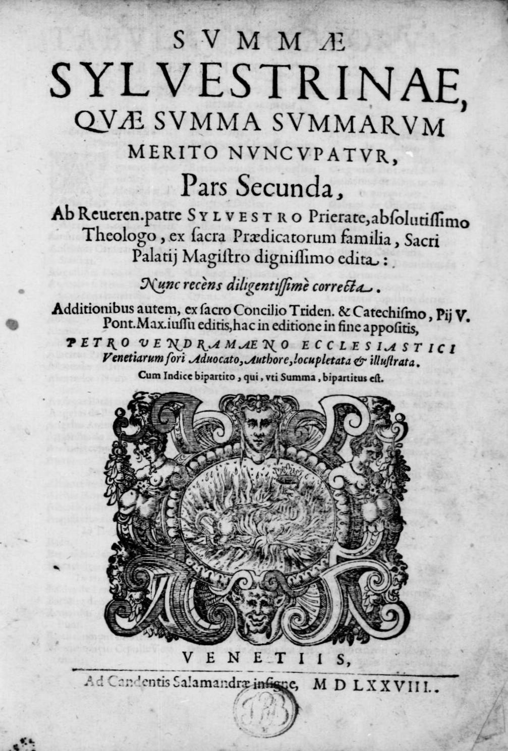 Frontespizio